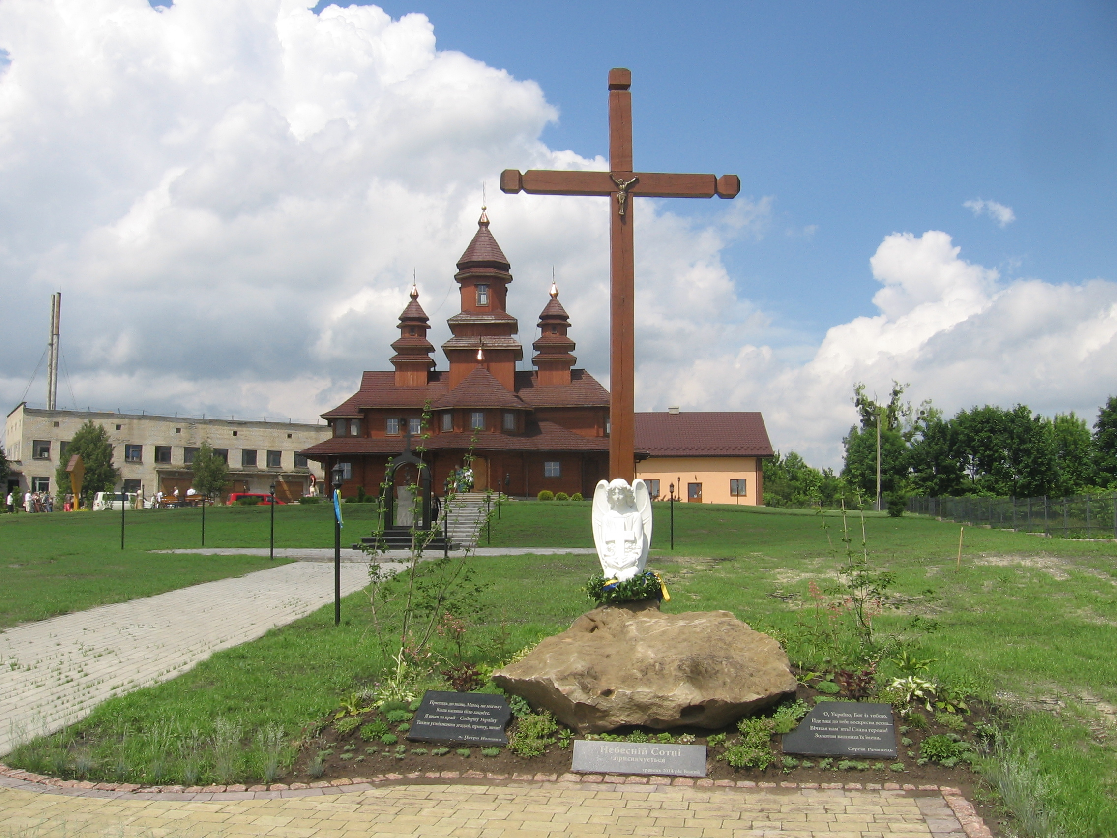 Пам'ятний знак Небесній Сотні у м.Дубно поруч із греко-католицькою церквою